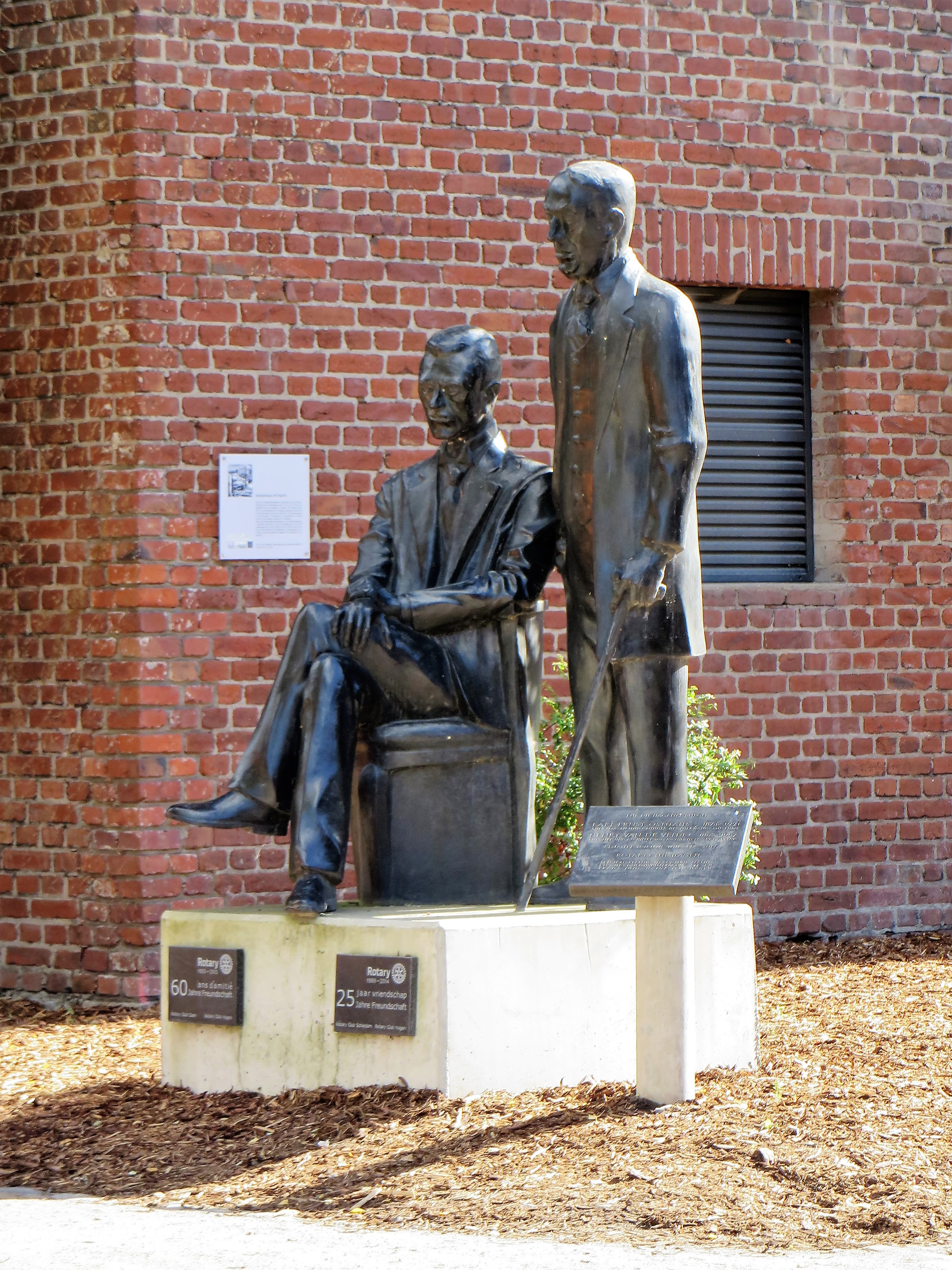 Skulpturen von Karl Ernst Osthaus und Henry van de Velde vor einer ehemaligen Kokerei auf dem Hagener Elbersgelände, Dödterstraße 10. Es zeigt (links) Karl Ernst Osthaus (1874–1921), Kunstmäzen und Gründer des Folkwang-Museums, rechts stehend Henry van de Velde (1863–1957), Künstler und Architekt vom Jugendstil bis zur Moderne. Gestaltet von dem Hagener Bildhauer Uwe Will und von einer Siegener Werkstatt in Spezialbeton gegossen. Im Jahre 2012 auf dem Elbershallengelände aufgestellt.